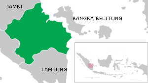 made by Borgx for Indonesian wikipedia Licensing Kategori:Peta penunjuk posisi di Indonesia